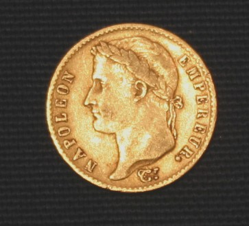 20 Francs Napoleon